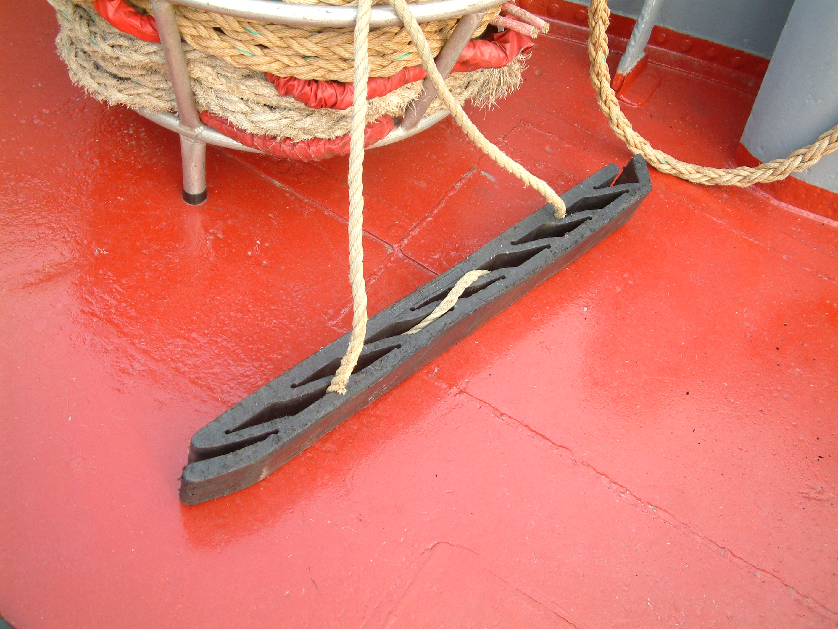 Een modern wrijfhout van kunststof, meestal vezelversterkt rubber. Wordt in de binnenvaart gebruikt - in plaats van het klassieke houten wrijfhout - om beschadiging van de verf van een binnenschip te voorkomen bij het afmeren.